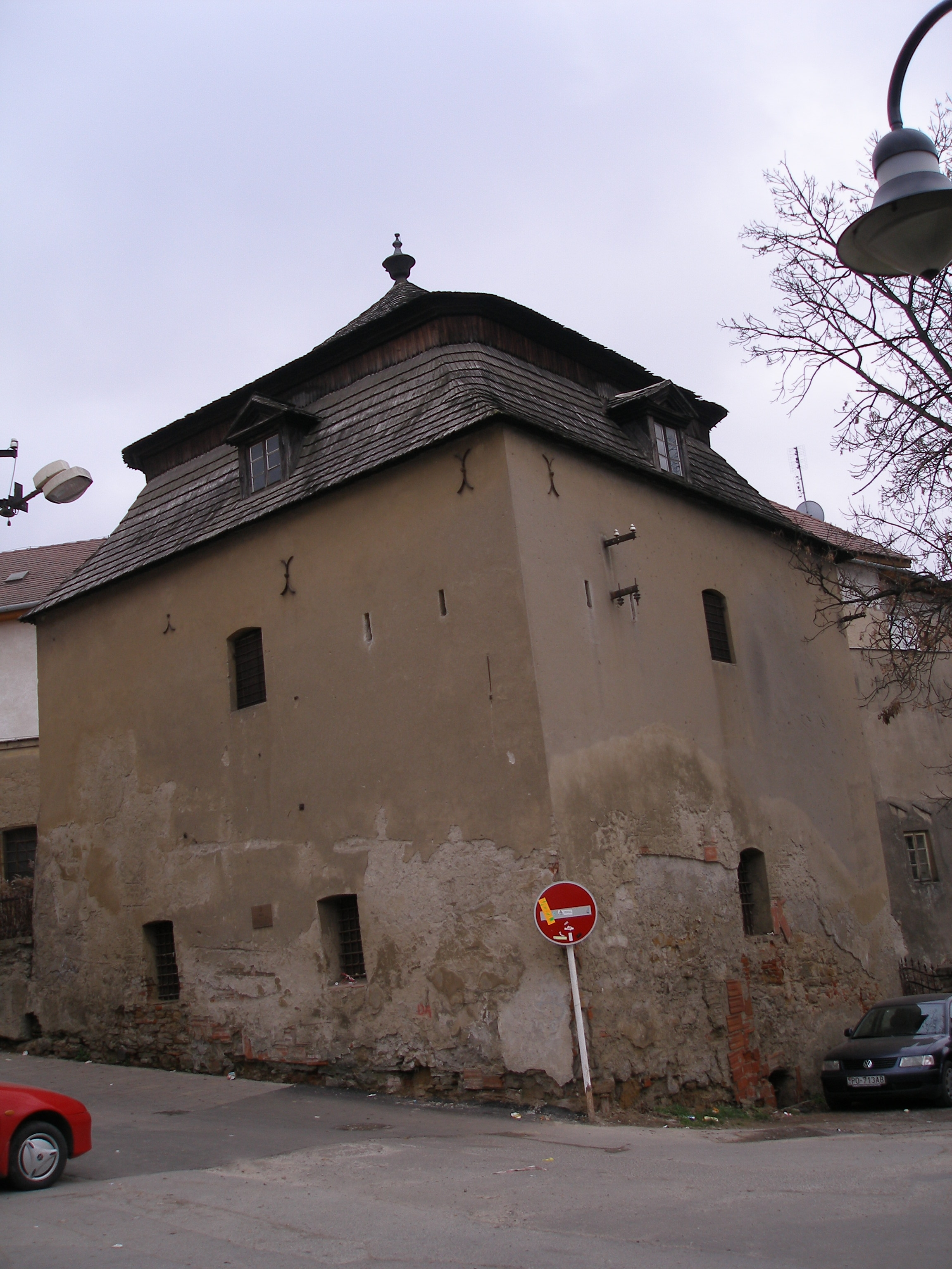 Prešov mestské pamiatky, Kumšt